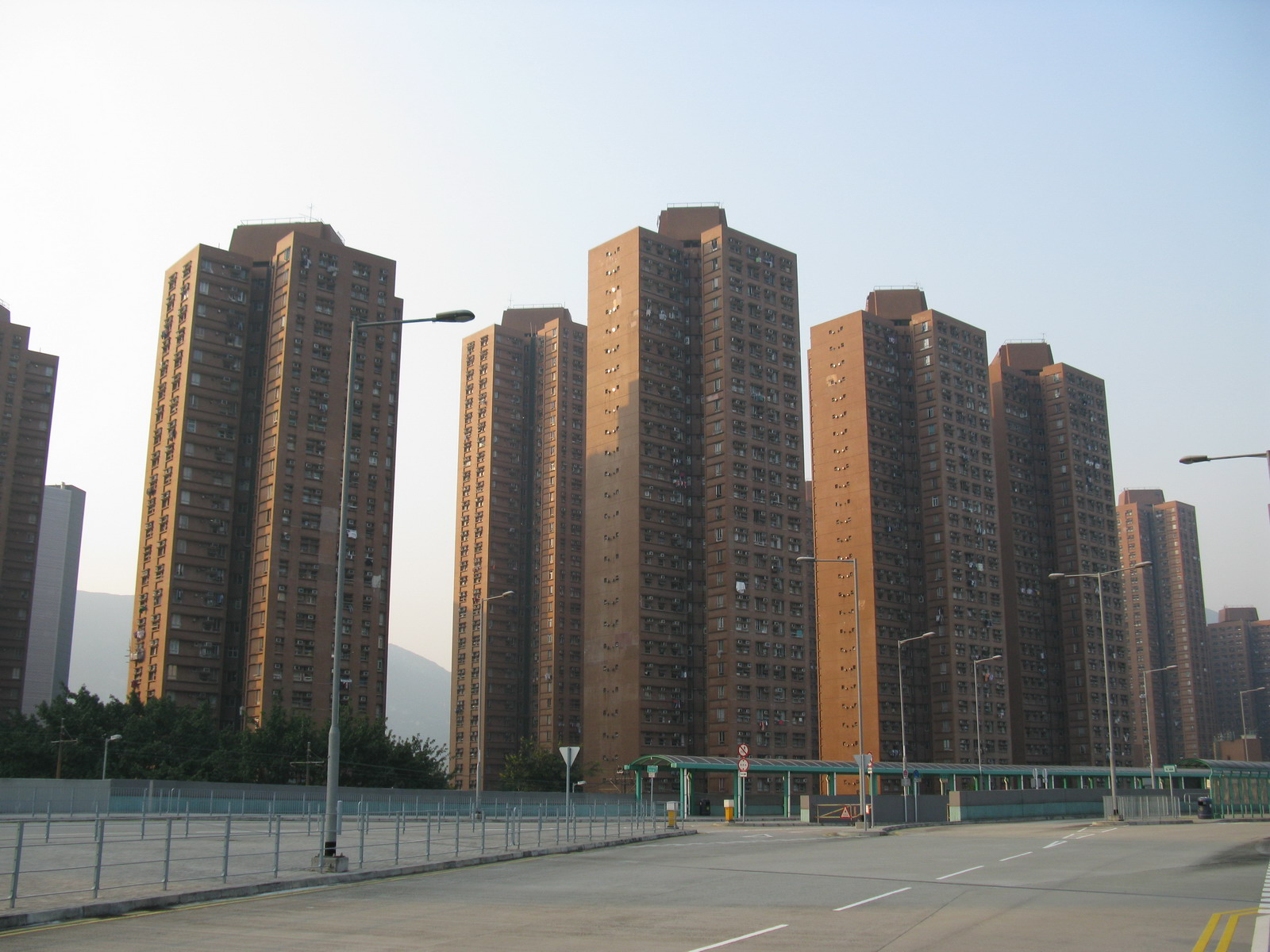 屯門-兆康苑 Siu Hong Court, Tuen Mun